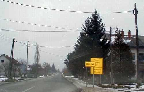 ulaz u selo Banovo od Vrbovečke strane